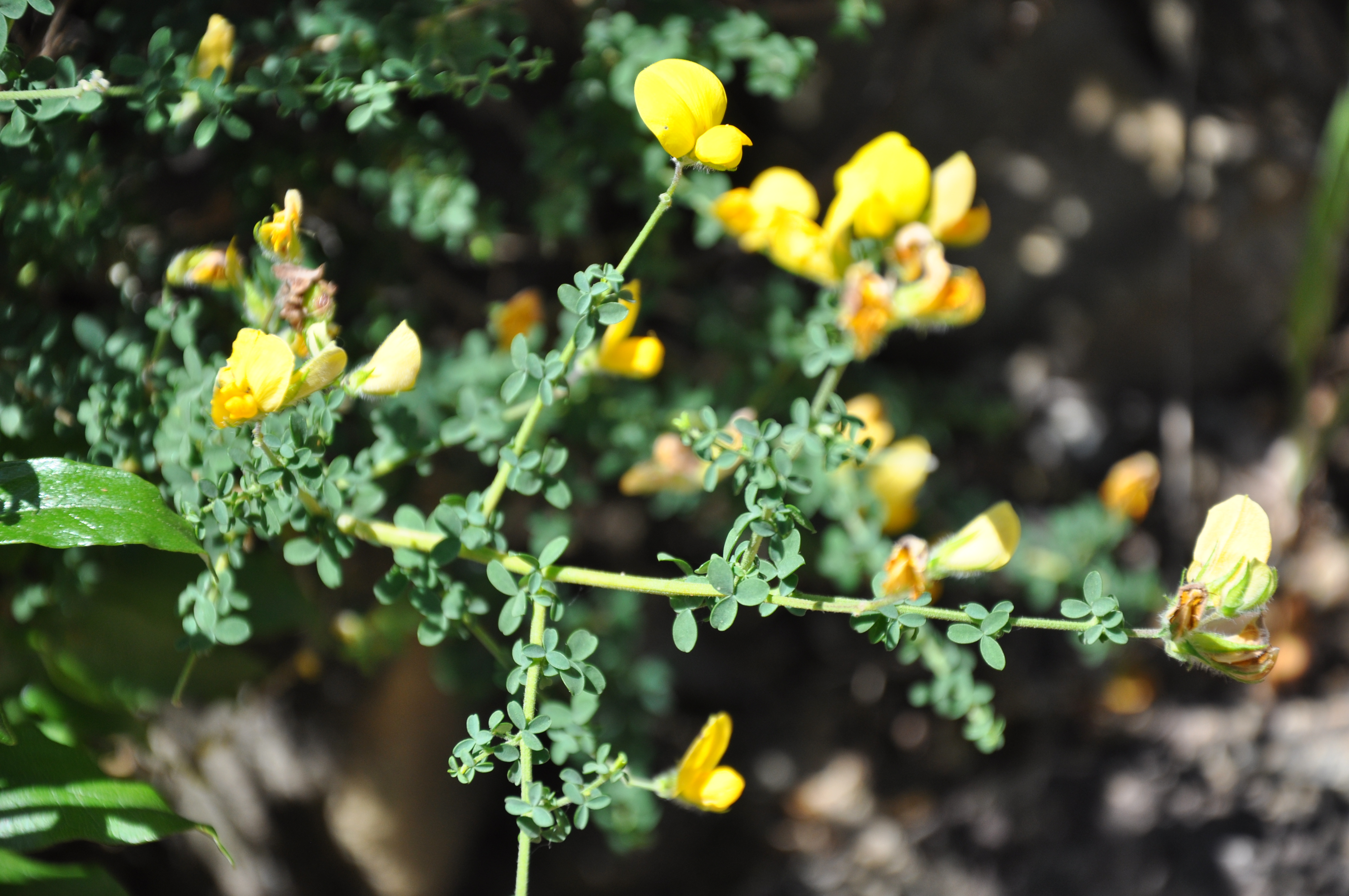 Rascavieja, Adenocarpus telonensis, Ruta de los Molinos, Patrite, Alcalá de los Gazules, Cádiz, España. This is a photography of a Special Area of Conservation in Spain with the ID: ES0000049. Natura2000 entry, EEA entry